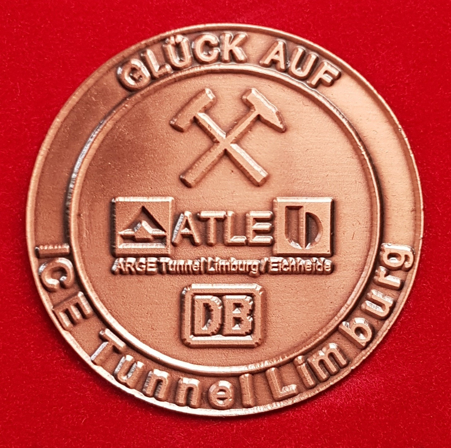 Gedenkmedaille herausgegeben zum Durchschlag des Limburger Barbaratunnels der Schnellfahrstrecke Köln–Rhein/Main am 1. Juli 1999